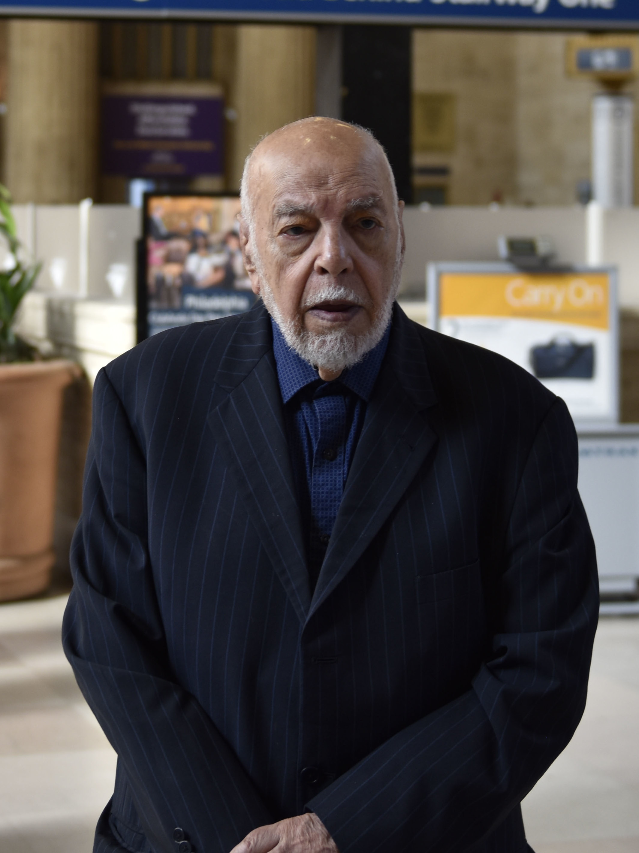 تصویر مربوط به مصاحبه فطرس مدیا با مهدوی دامغانی